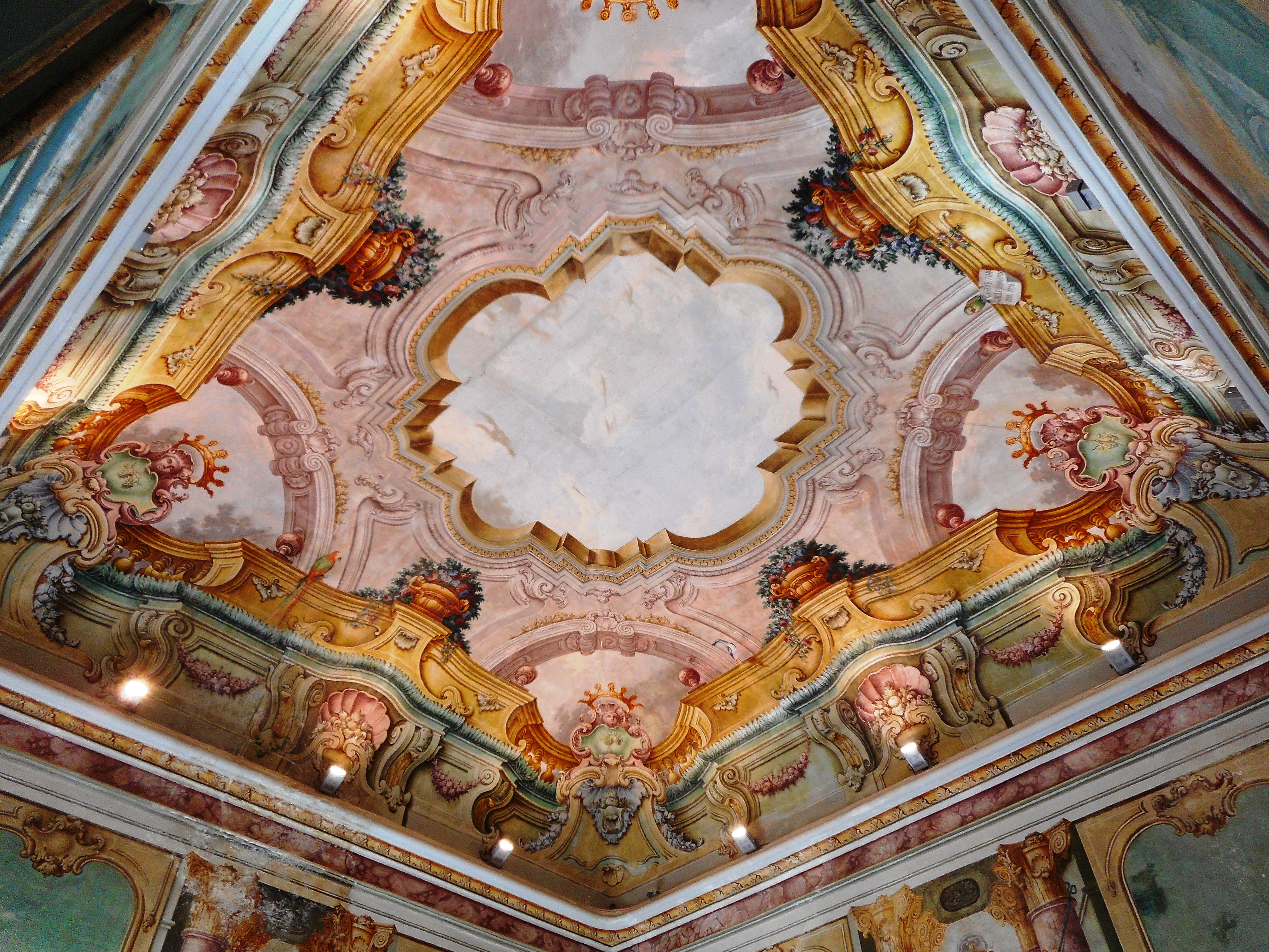 Volta del Salone Fumagalli nell'Oratorio dei Bianchi